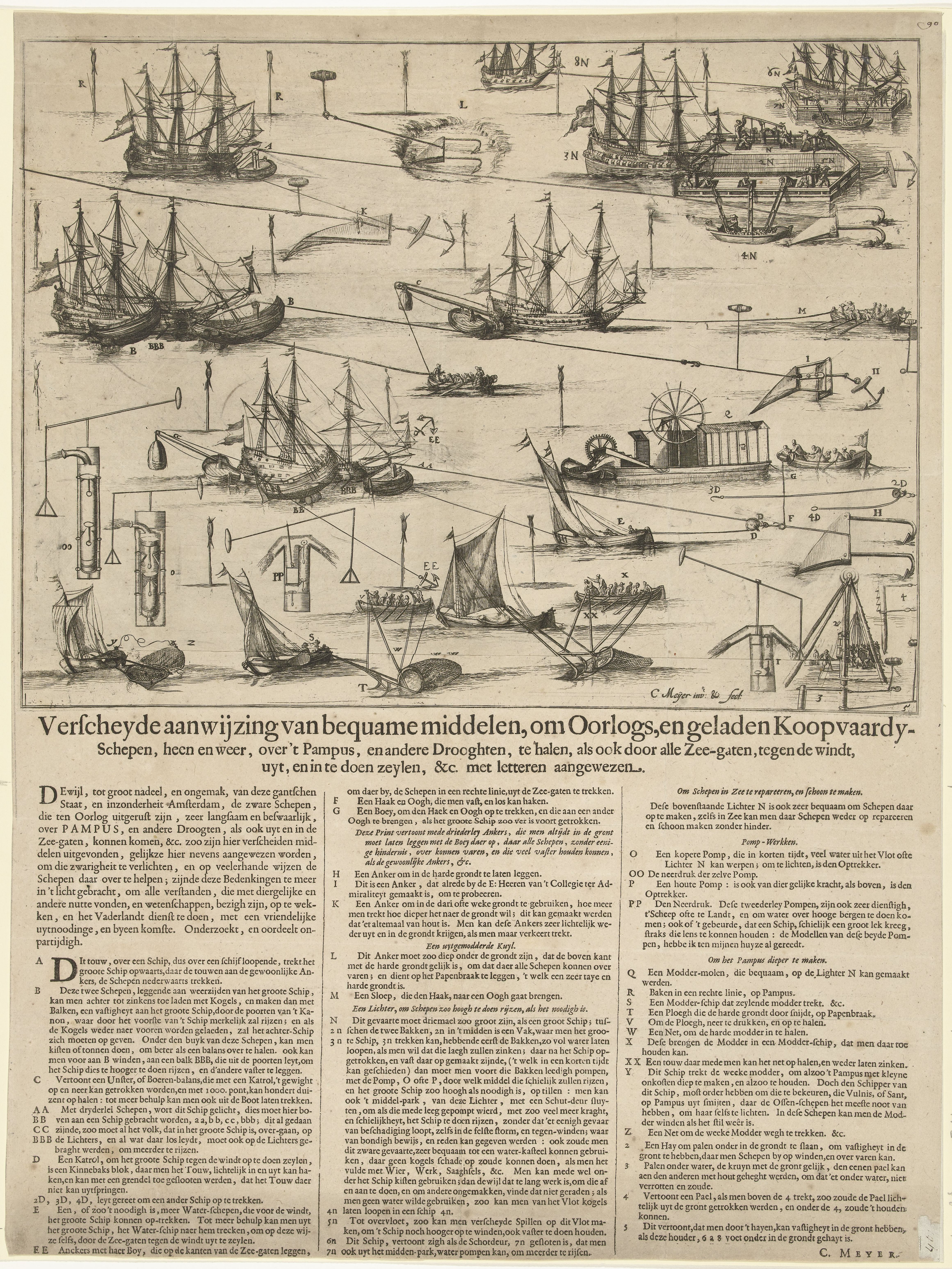 Verscheyde aanwijzing van bequame middelen, om Oorlogs, en geladen Koopvaardy-Schepen, heen en weer, over 't Pampus, en andere Drooghten, te halen (titel op object) Blad met een overzicht van de verschillende middelen en manieren om schepen over het Pampus (of andere droogten) heen te halen. Op het blad onder de plaat staat de uitleg van de methodes in 3 kolommen. De prent is opgevouwen geweest en met de hand geadresseerd aan de heer Dirk Mels te Amsterdam.